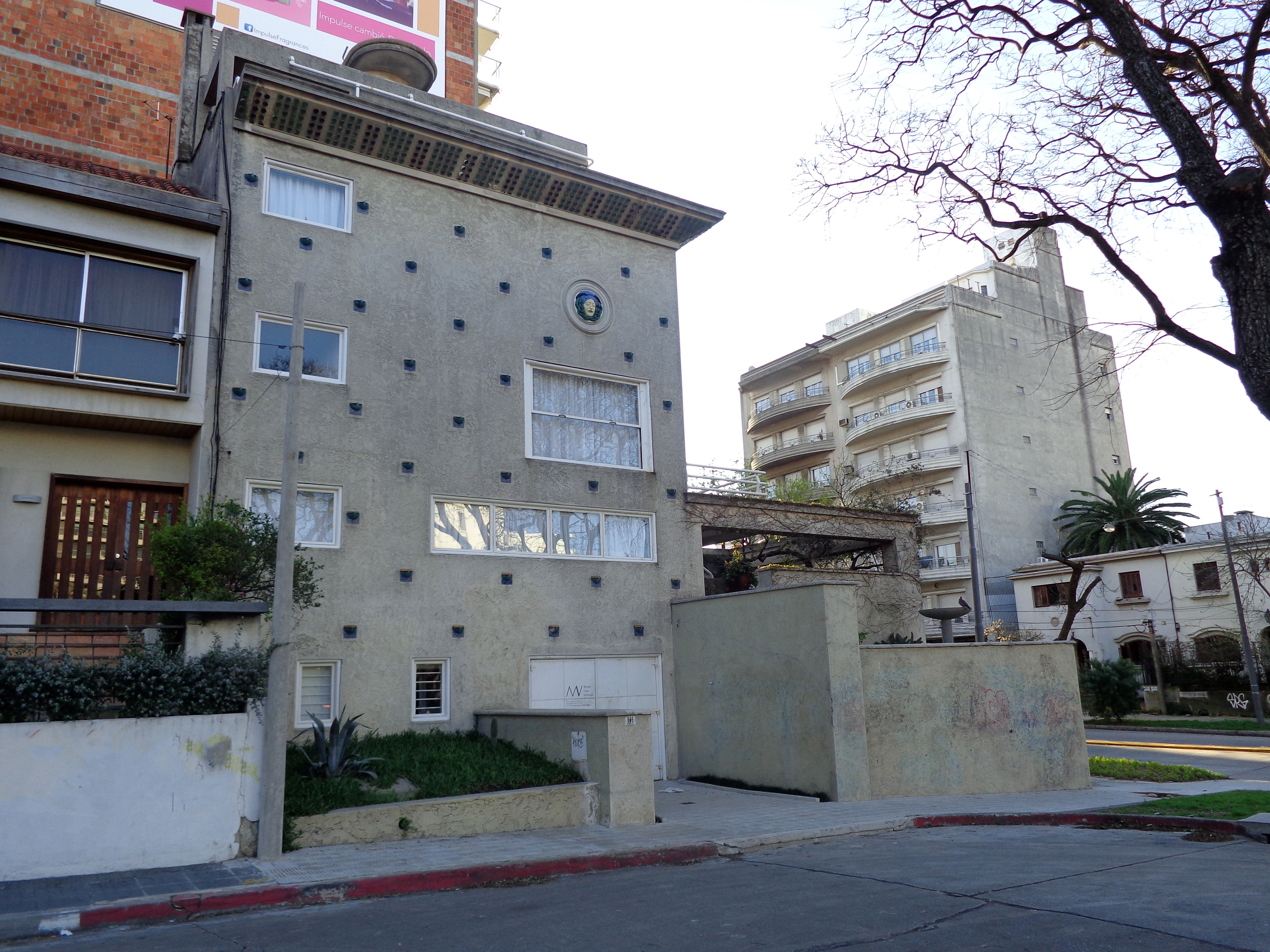 Casa del Arq. Julio Villamajó. Ubicada en el departamento de Montevideo